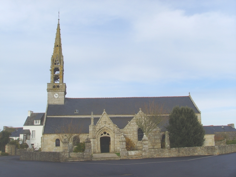 Entrée sud de l'église paroissiale Saint Goulven, Goulien (Finistère, France)